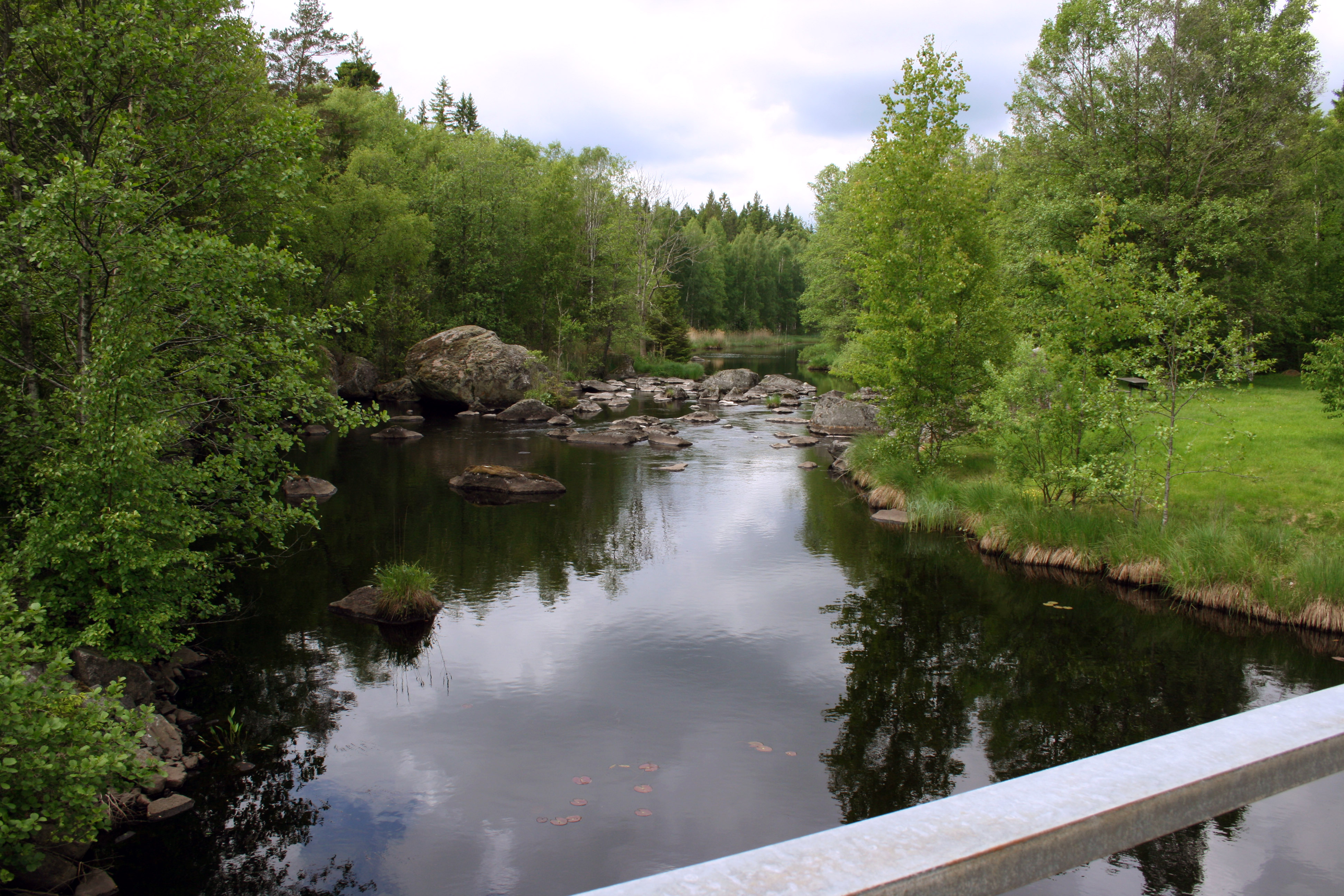 Bräkneån i södra Småland, där den korsas av väg 29.